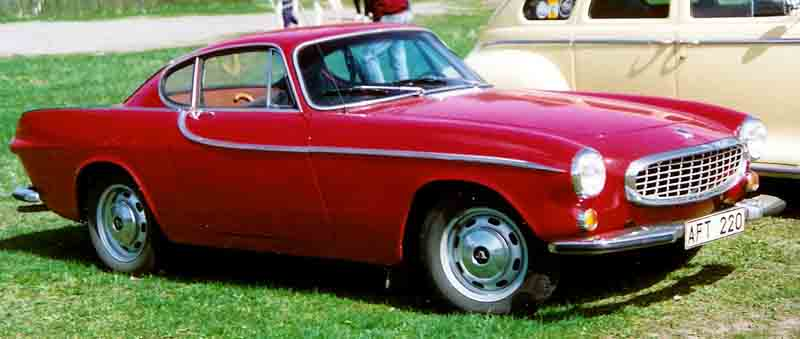 Volvo P1800 Coupé